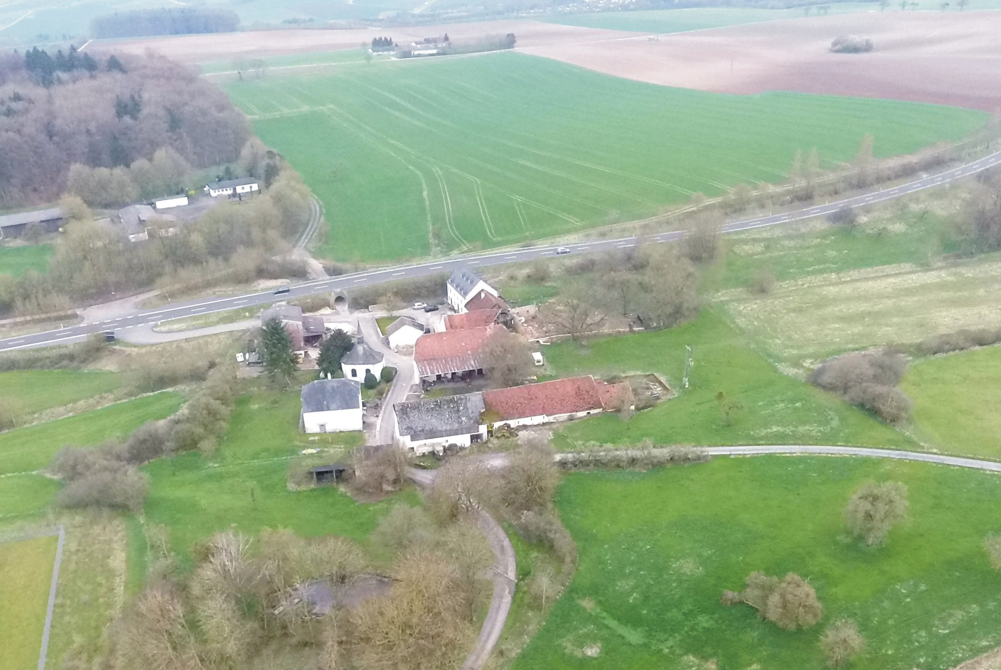 54634 Bitburg-Irsch, nördlich vom Ort. Aufnahme von 2018.